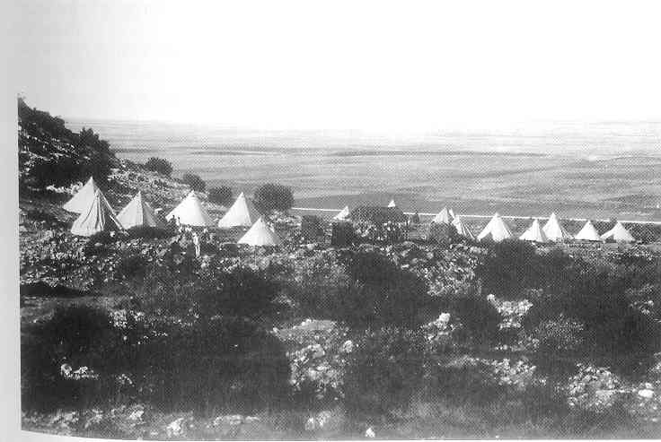 מחנה הגדוד